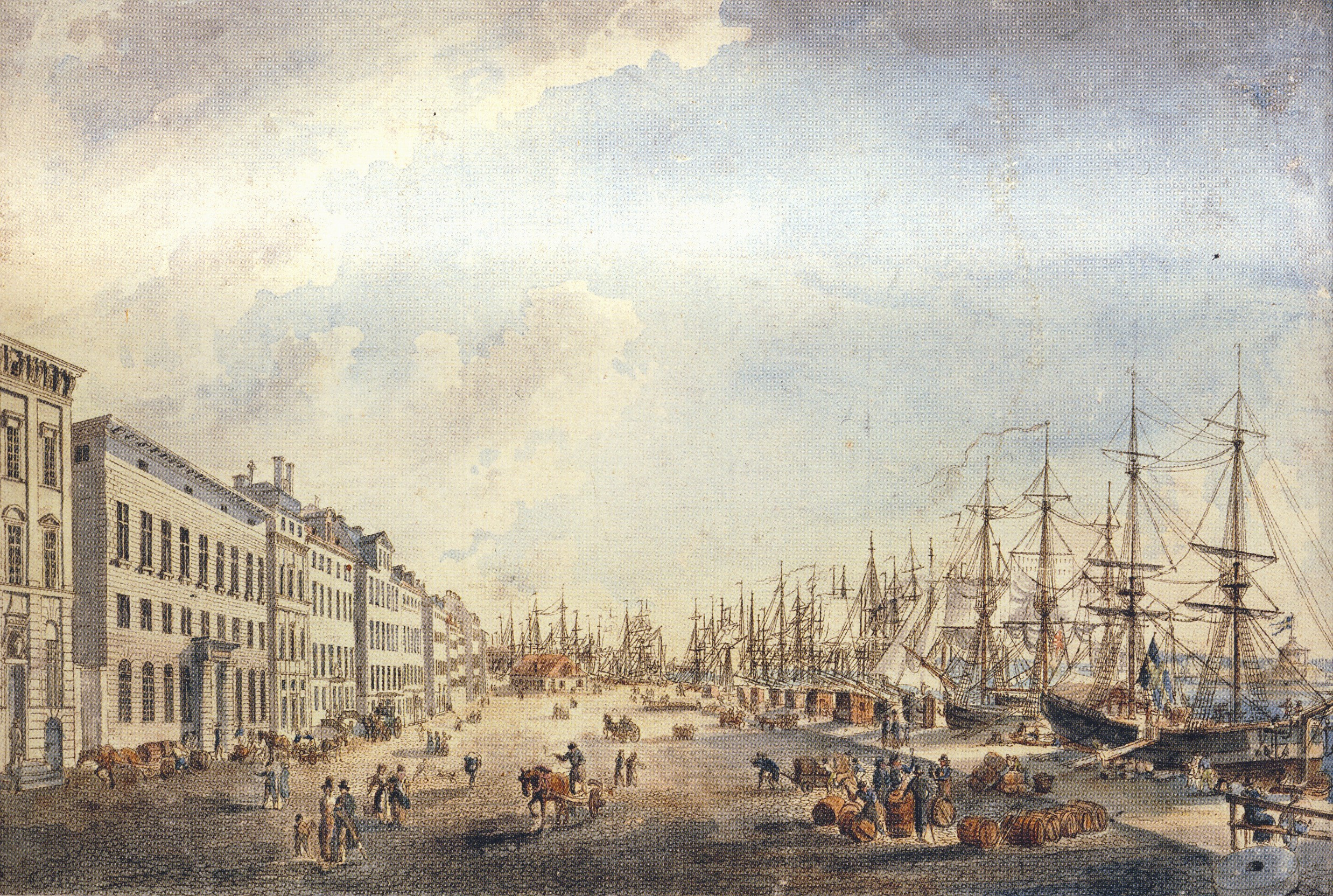 Skeppsbron vid 1700-talets slut